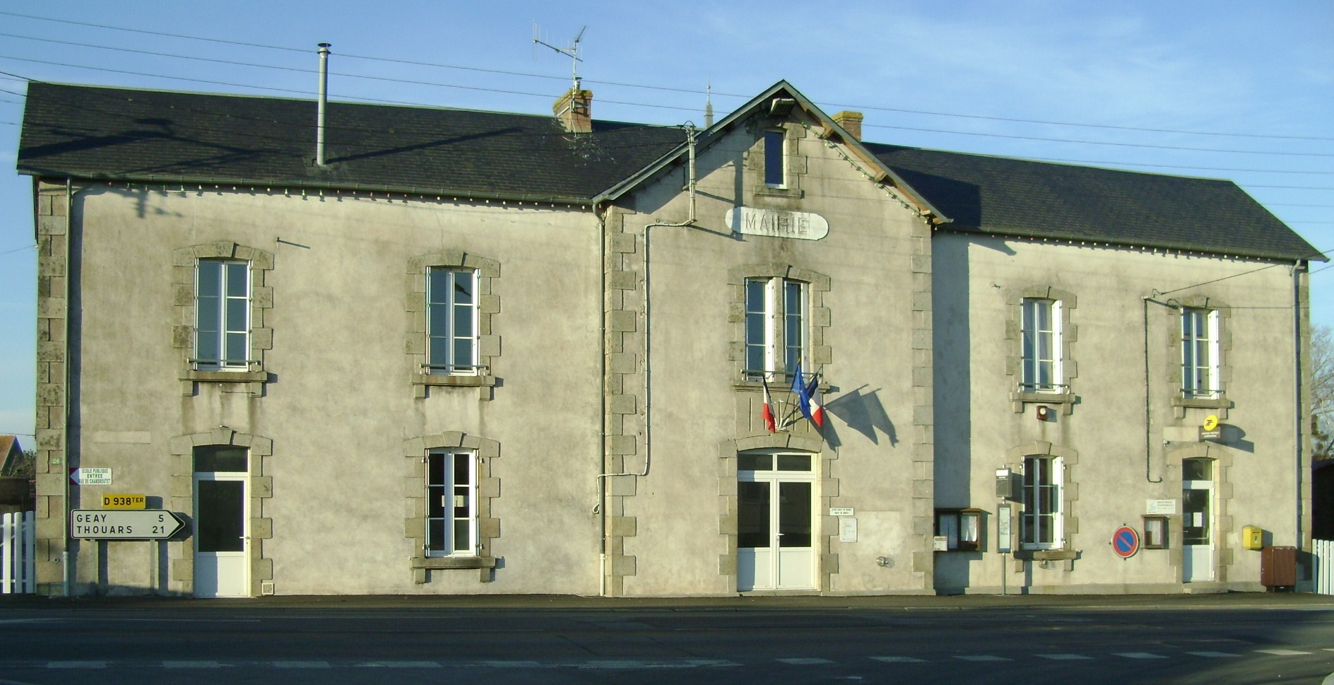 Mairie de Noirterre (Deux-Sèvres - France)